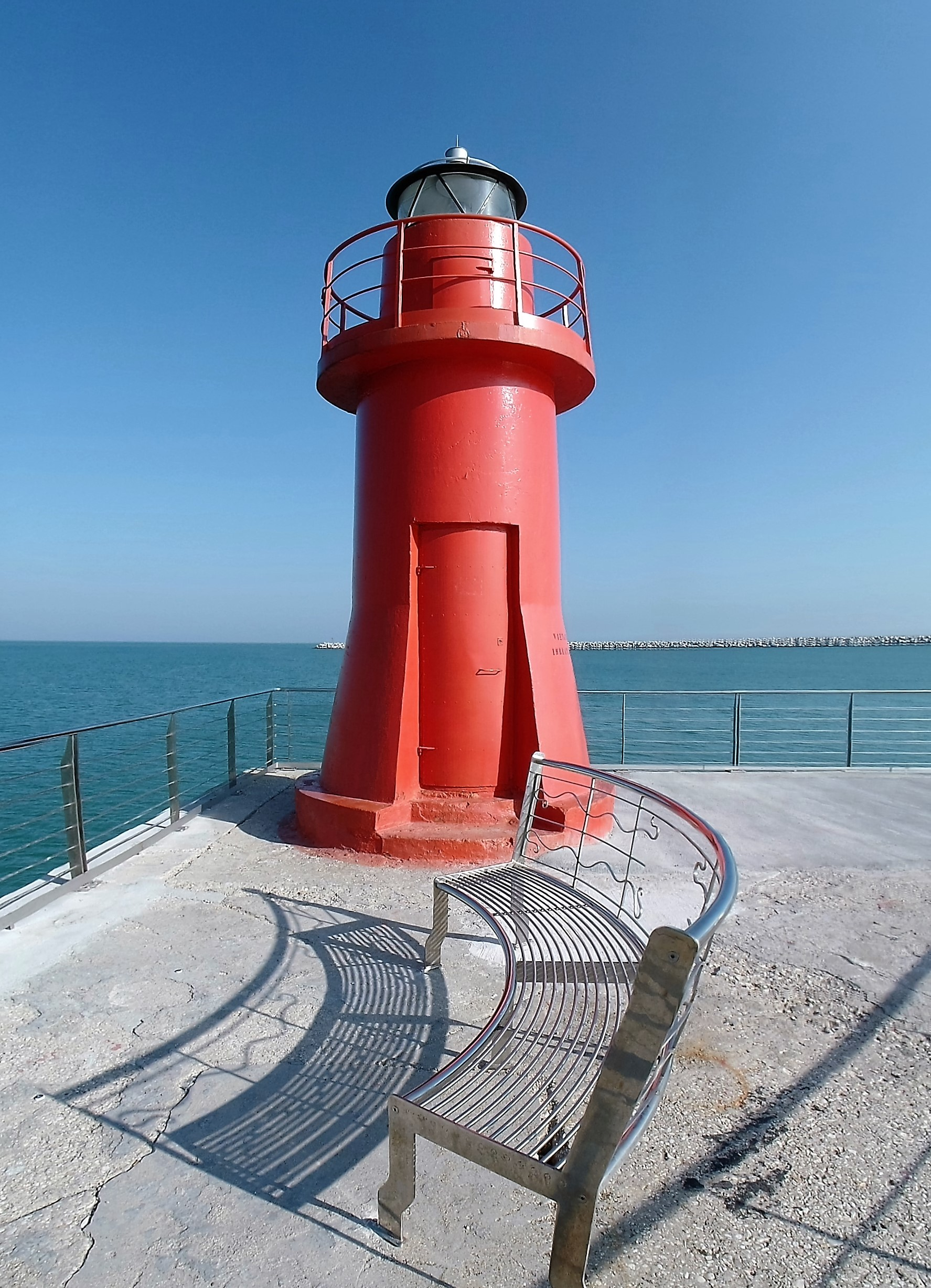 Lanterna Rossa Ancona - Panchina